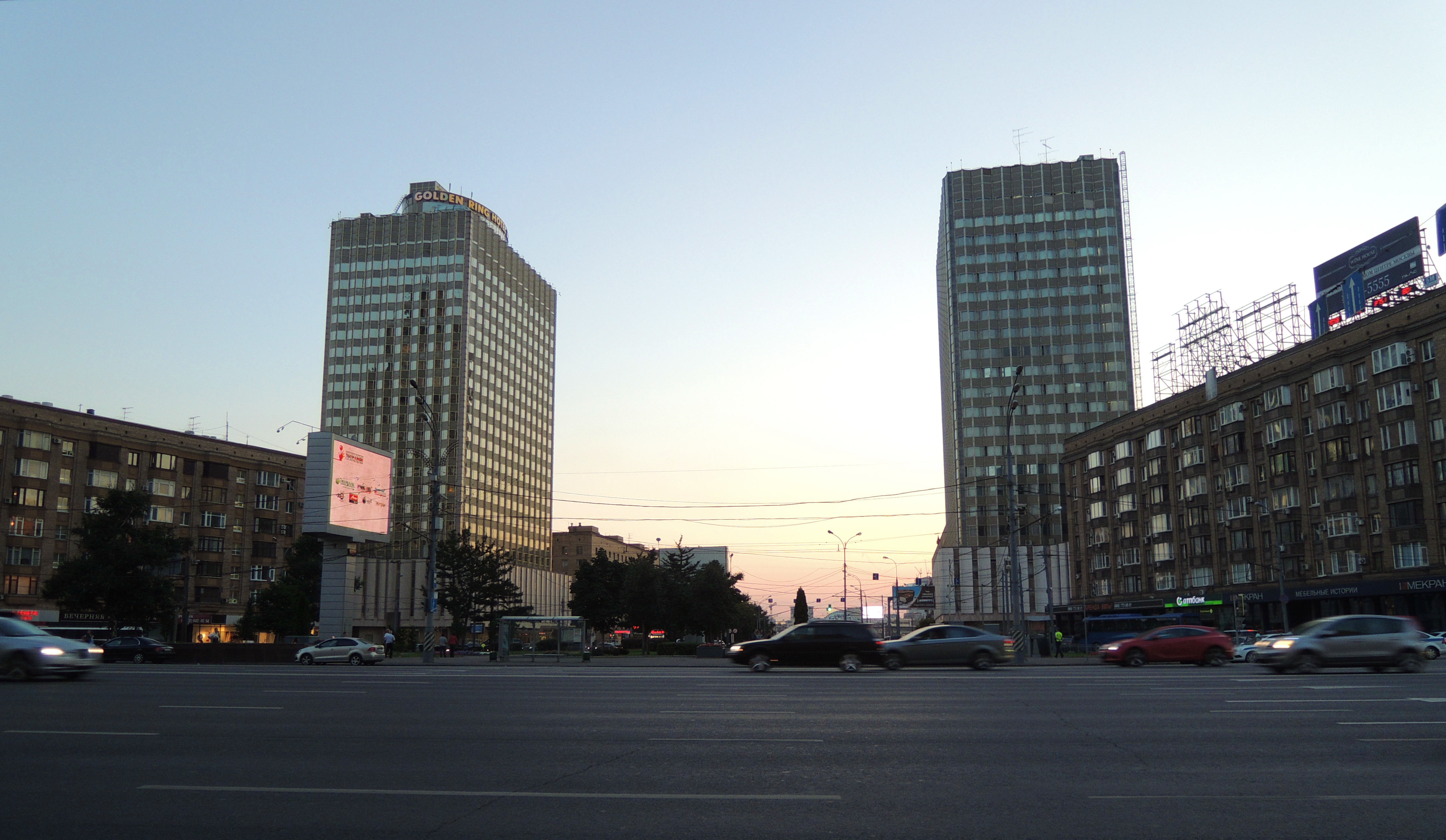 Смоленская-Сенная площадь